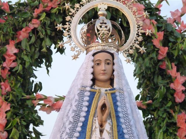 Verge d'Itati Corrientes, Argentina, dab l'autorizacion de l'Arqibisbat (Arzobispado de Corrientes)